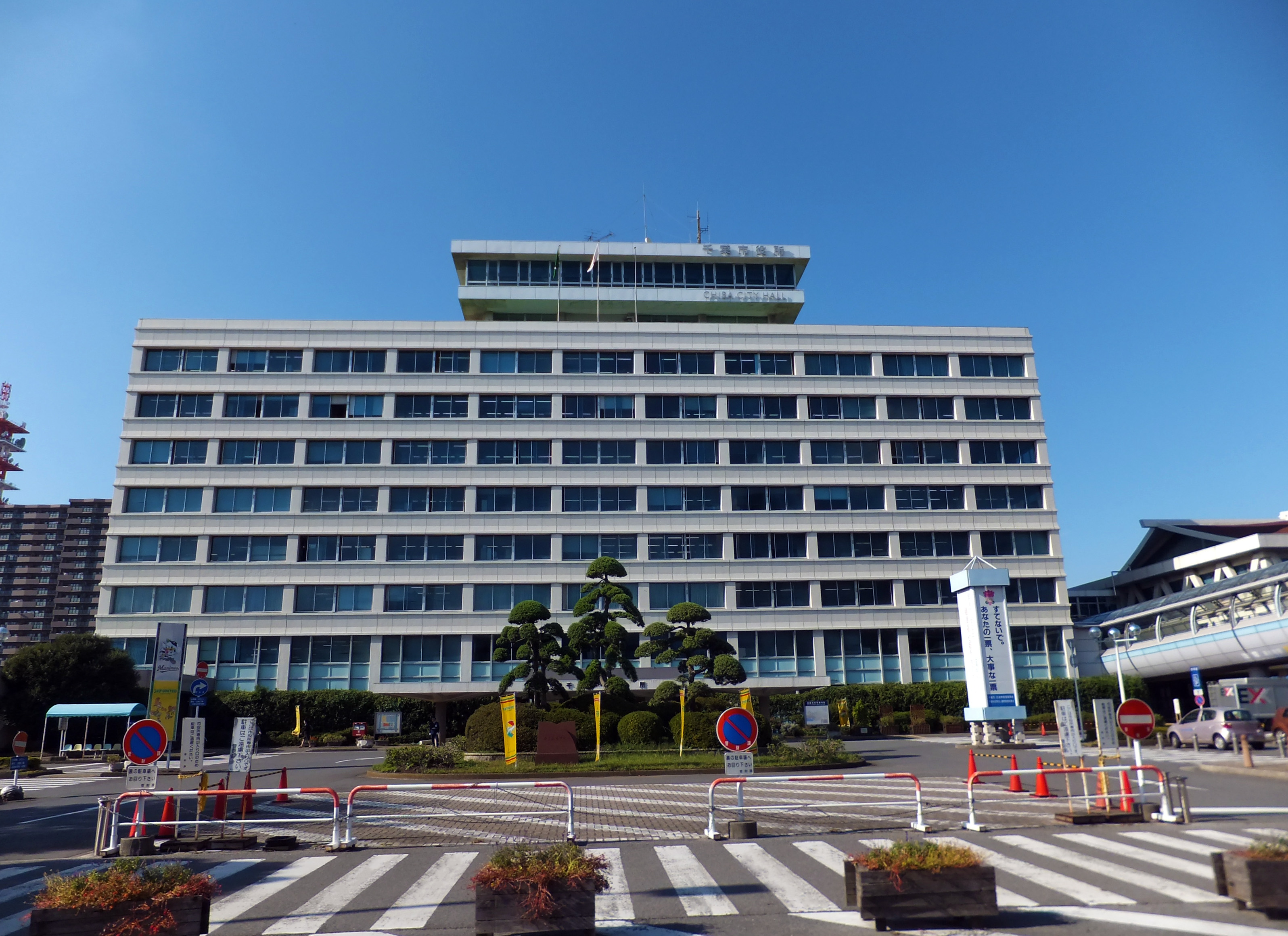 千葉市役所本庁舎（千葉県千葉市中央区）